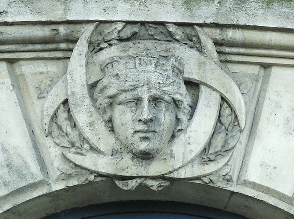 Bordeaux mascaron quai Richelieu aux petites armoiries de la ville